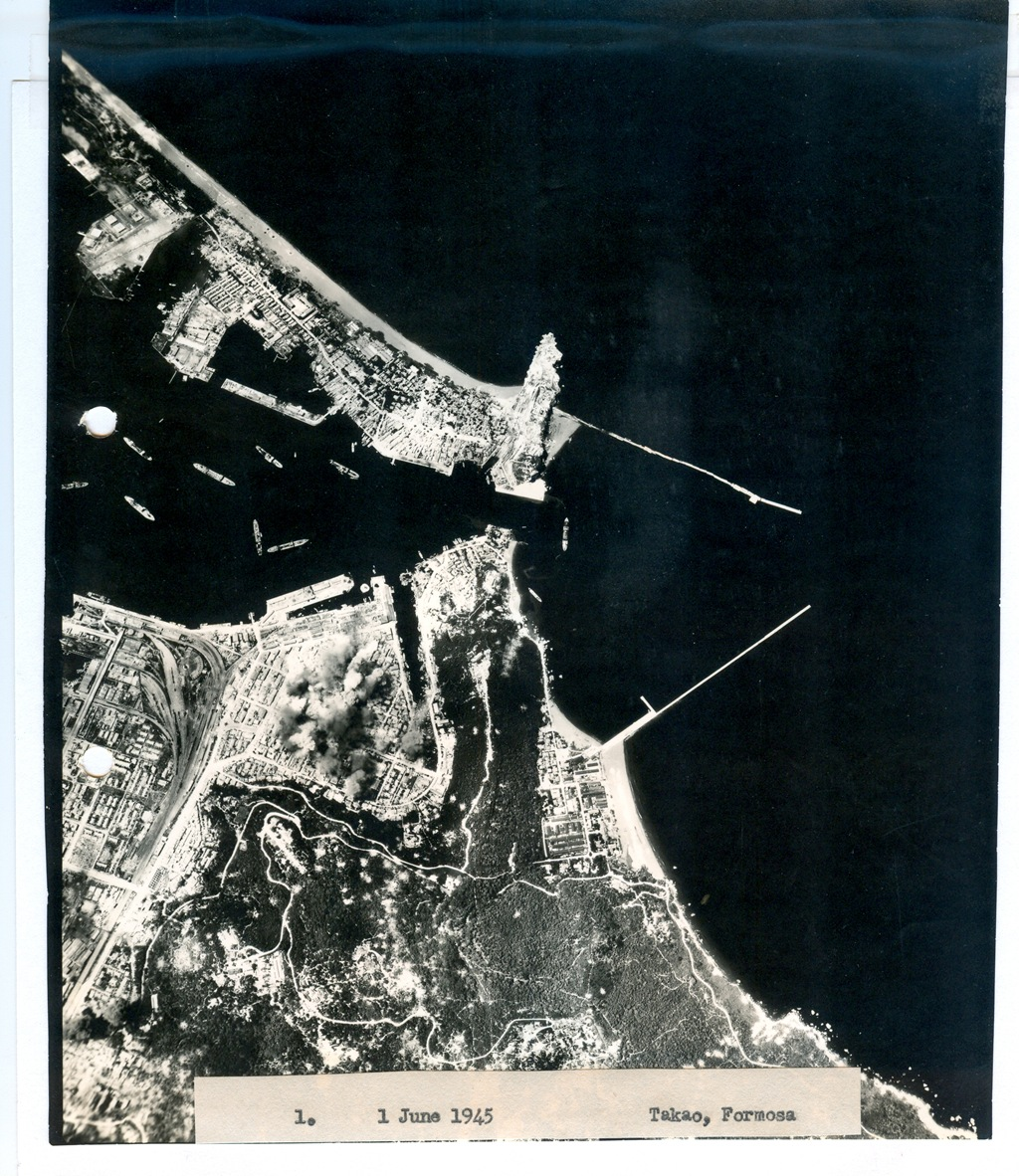 File link: [1]